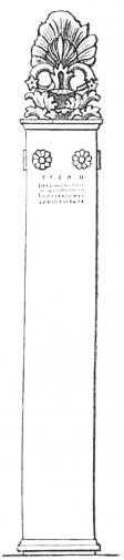 Stele